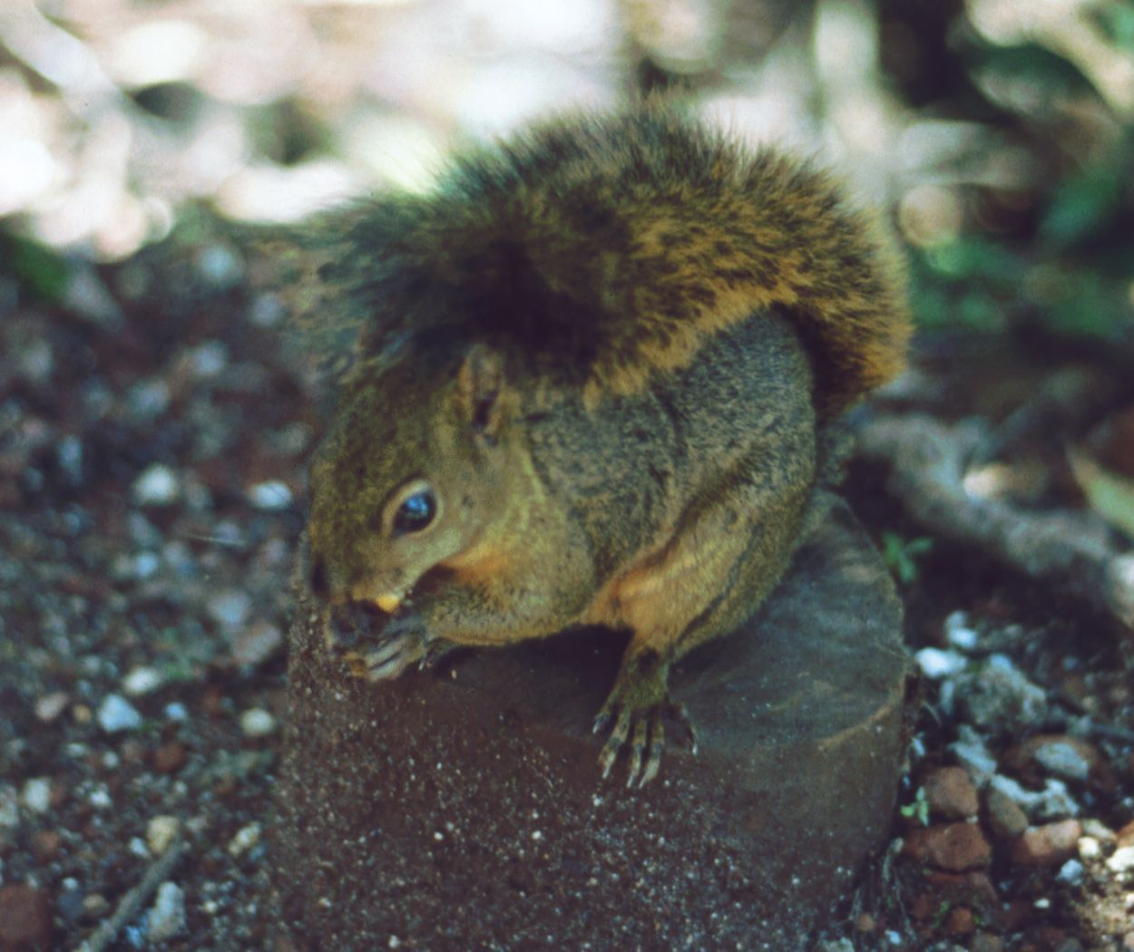 Mittelamerikanisches Berghörnchen (Syntheosciurus brochus), Sciuridae - Costa Rica, Cordillera Central, Volcán Poás, beim alten Kratersee (Laguna Botos)